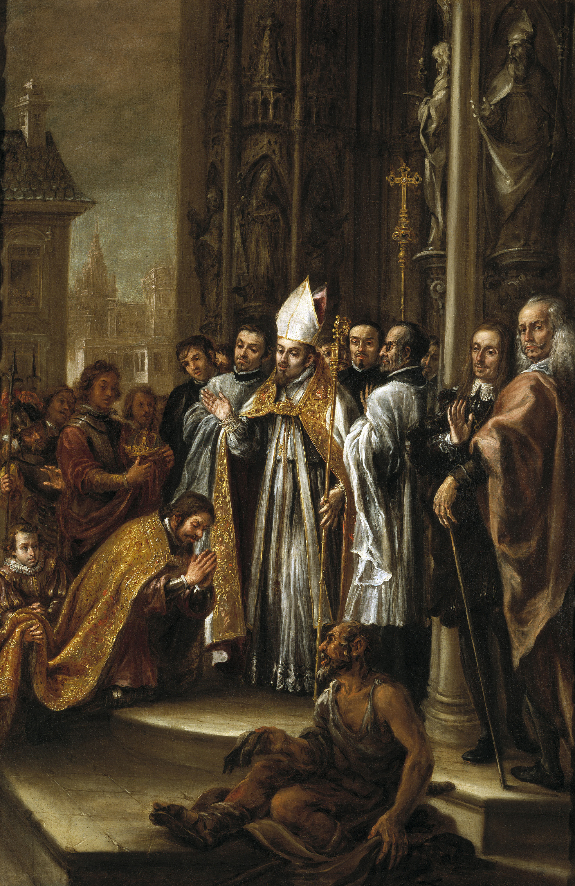 La obra representa al arzobispo San Ambrosio de Milán perdonando al emperador Teodosio I el Grande por la matanza que había perpetrado en la ciudad de Tesalólica y permitiéndole el acceso al interior de la catedral de Milán, que hasta ese momento le había sido vetado.